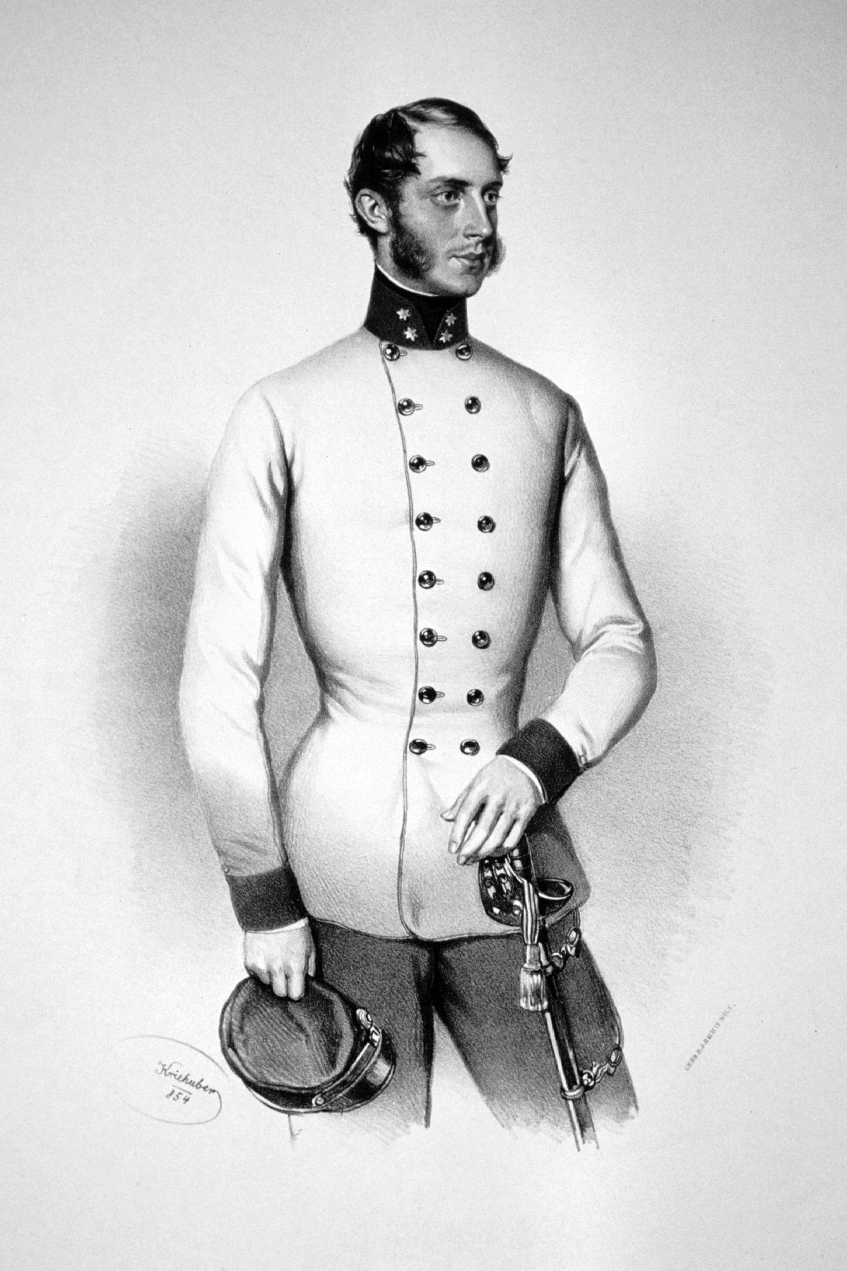 Ladislaus Pejacsevich (Ladislav Pejačević) 1824-1901, Banus von Kroatien, Mitglied der ungar. Magnatentafel, Reichsratabgeordneter. Lithographie von Josef Kriehuber, 1854